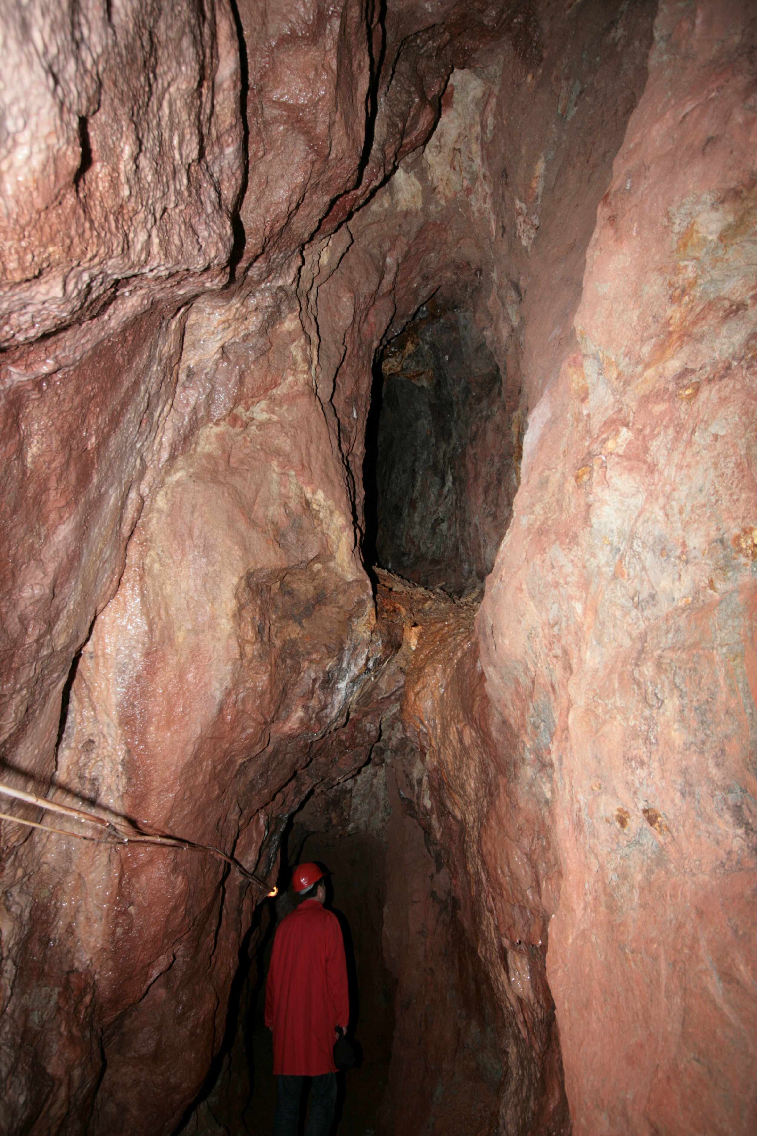 Beschreibung: Stammtisch Sauerland im Phillippstollen Olsberg Quelle: Eigenes Foto Urheber: Wolfgang Poguntke Aufnahmedatum : 12.07.2008